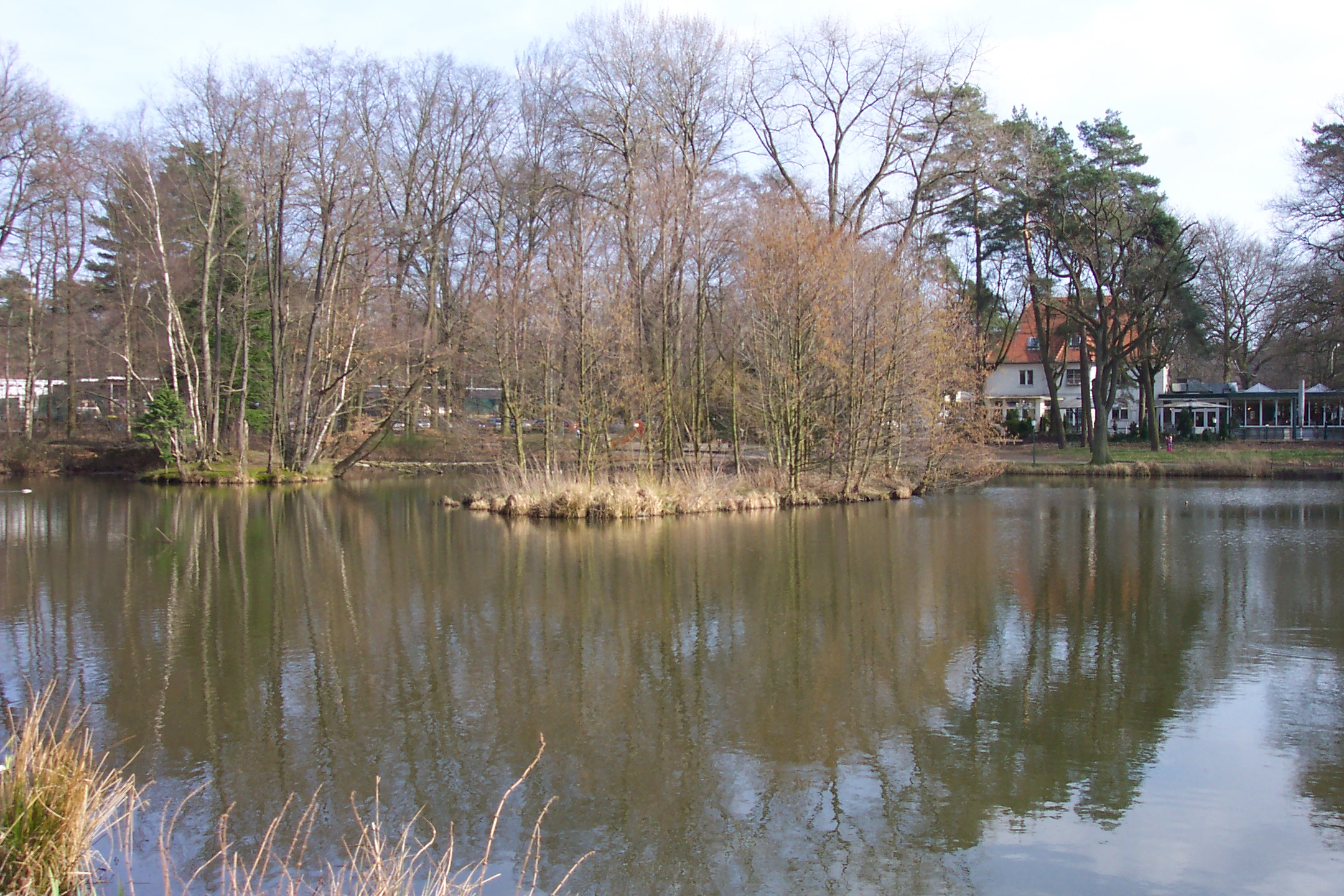 Hildener Heide, Hilden